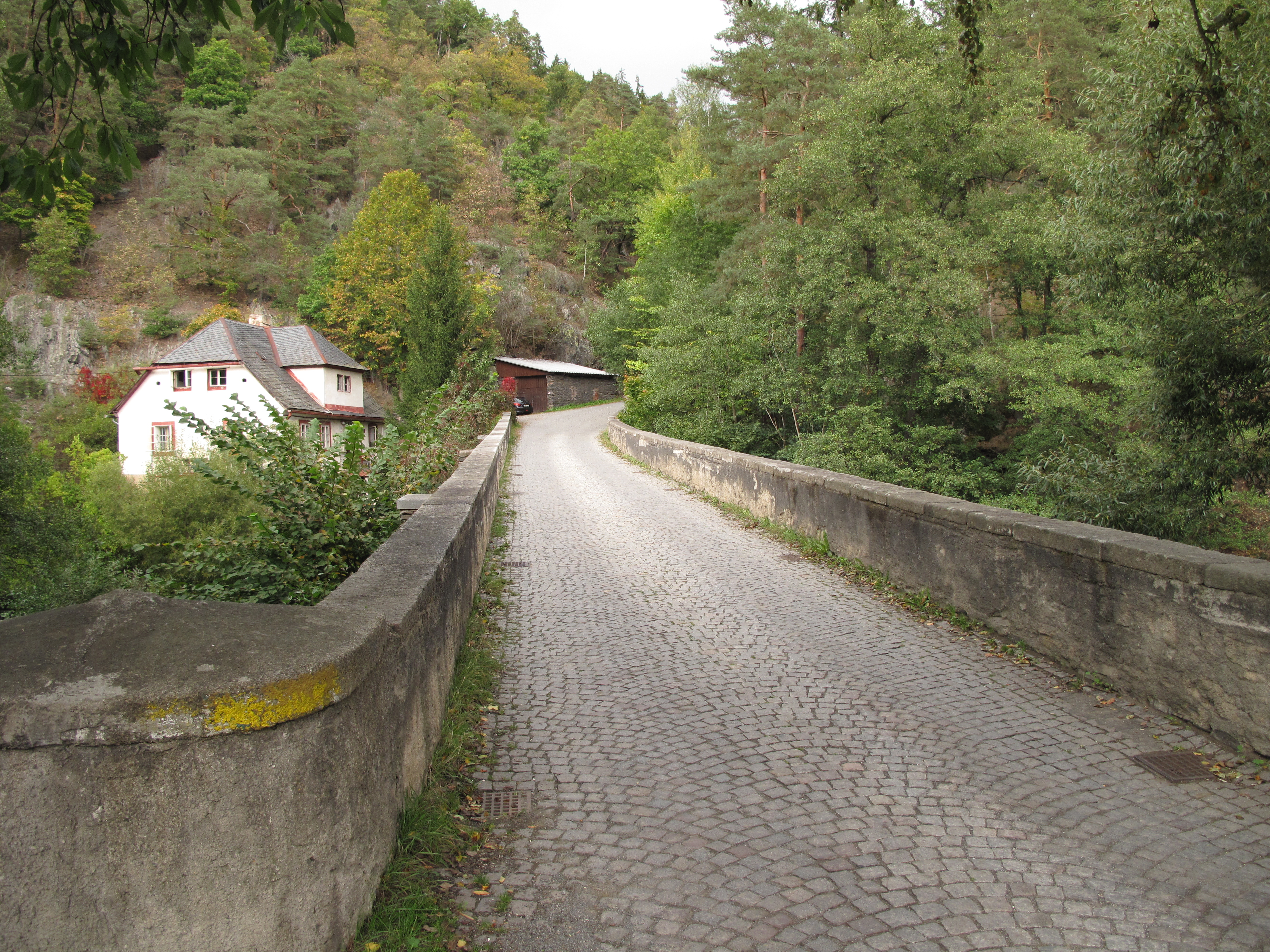 Mostovka kamenného mostu v Rabštejně nad Střelou. Okres Plzeň-sever, Česká republika.